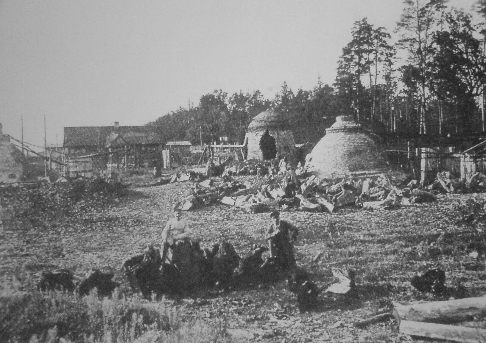 Smolarnia w Majdanie (dzielnica Hajnówki) 1916 r.